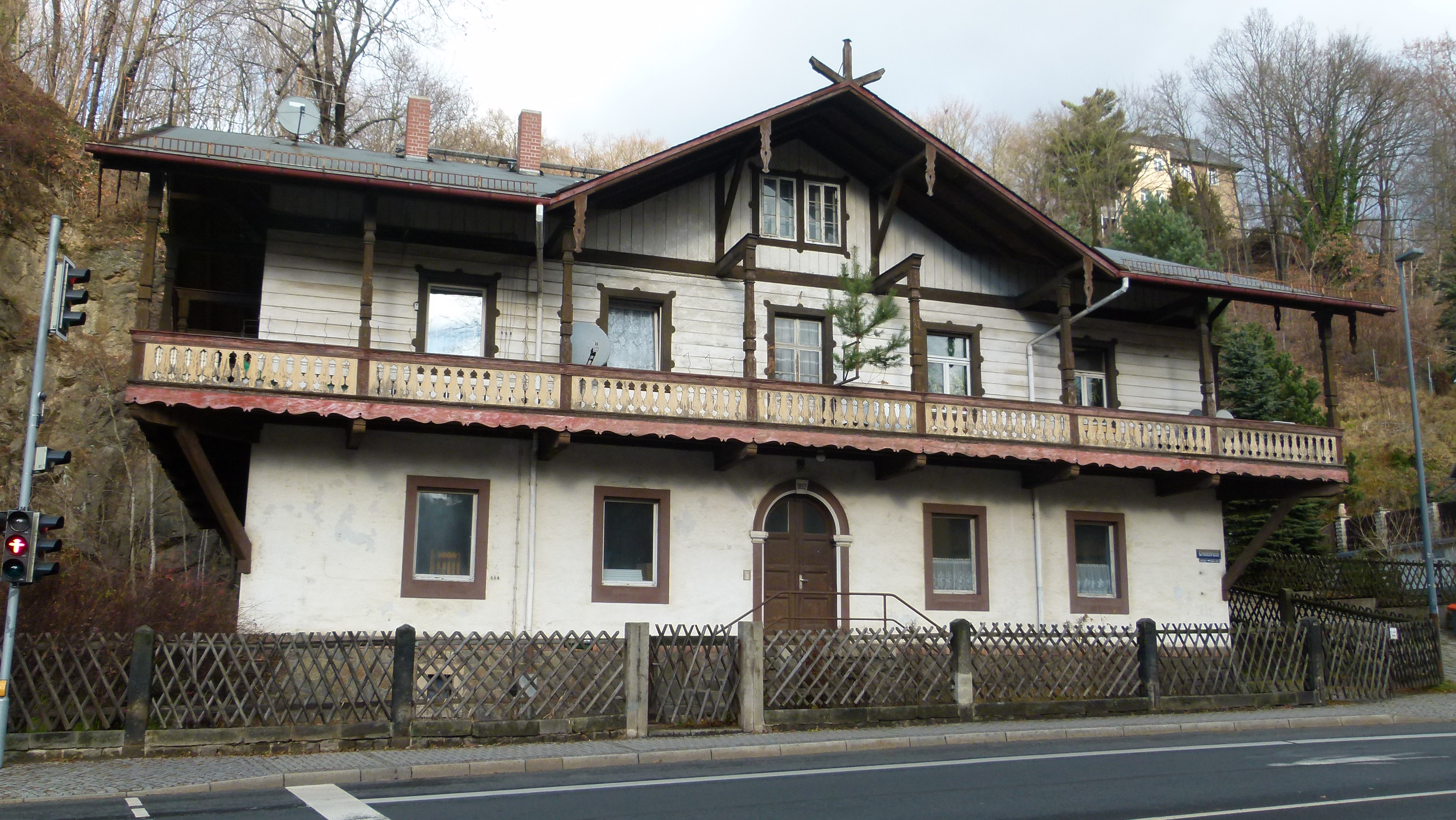 Schweizerhaus, denkmalgeschützt, Grundstraße 137, Loschwitz, Dresden